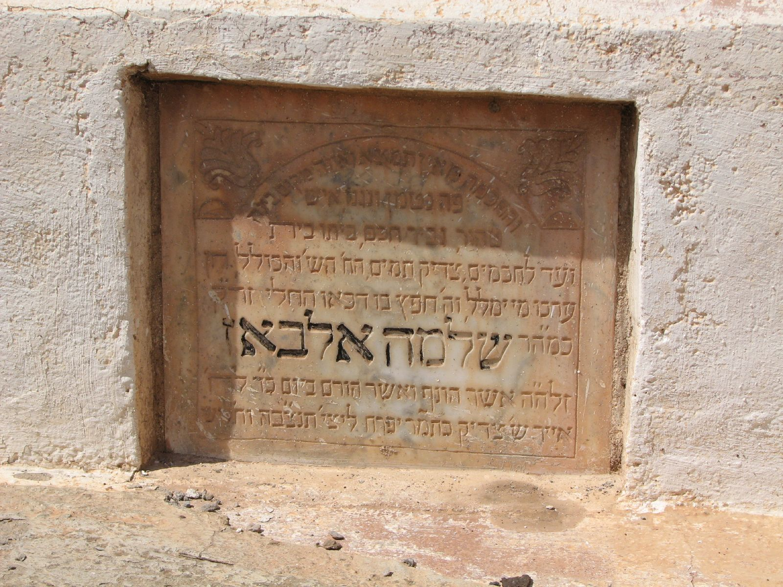 Rabbi Shlomoh Elbaz Tombstone קבר שלמה אלבז, ספרו